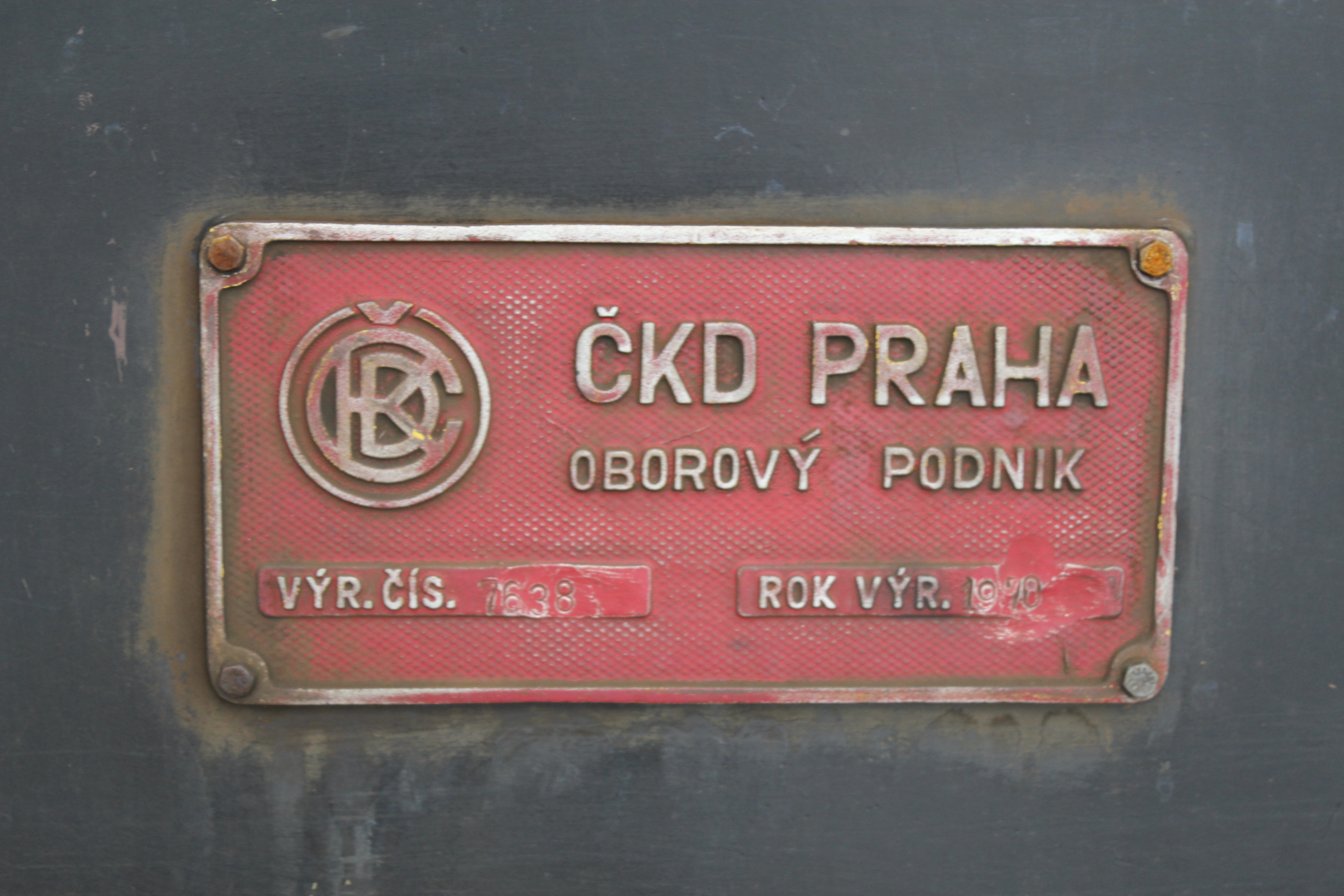 Motorová lokomotiva řady 751 nebo T 478.1 jak byla označována do roku 1988. Skříňová čtyřnápravová dieselová lokomotiva. Uspořádání pojezdu Bo- Bo . Označována přezdívkou Zamračená,nebo Bardotka podle charakteristických oken a tvarování čela lokomotivy. Podle zkušeností v provozu je považována za jednu z nejlepších lokomotiv ČKD Praha. ČKD ji vyrábělo v letech 1964 - 1971. Parametry elektrický stejnosměrný přenos výkonu, max. povolená rychlost 100 km/h, trvalá tažná síla lokomotivy 120 kN, maximální tažná síla 220 kN, hmotnost 75 tun. Část strojů byla v 90. letech vybavena zařízením pro elektrické vytápění vlaků a označována jako řad 749.